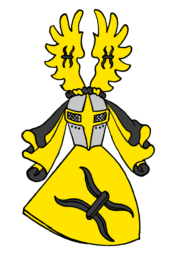 Gottfried es Albrecht a Graf von Hatzfeld családbol származik. Fö-Gróf (Márki) voltak Hessen,Németország.